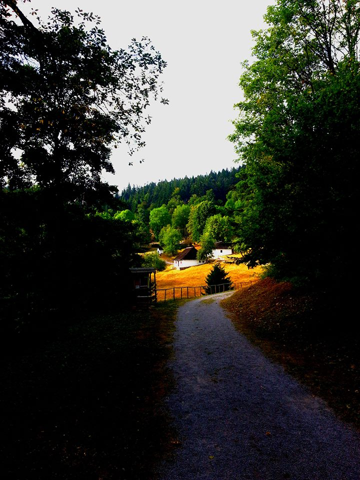 Priestor pamätný